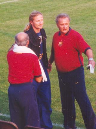 Emmanuel Petit als voetballer van FC Barcelona (juli 2000)